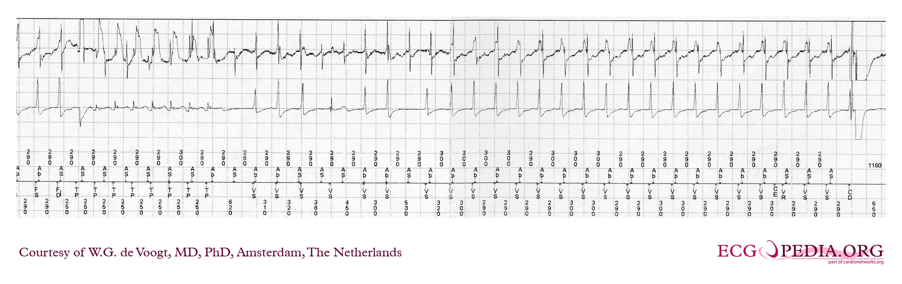 ICD E_A3